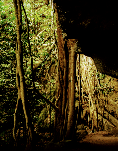 Parque ecoturístico Tzimbác